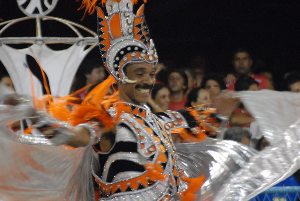 Desfile das escolas de samba do Rio de Janeiro de 2009. (Foto Henrique Matos)